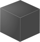 Logo vom Blackbox WM